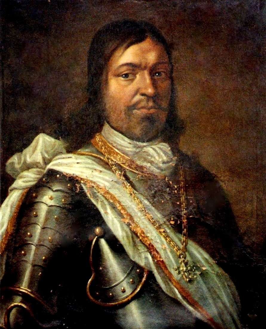 Gemälde von Rudolf Mohr, 1624-1702, Luzerner Schultheiss und Oberst in Fremden Diensten (Privatbesitz)